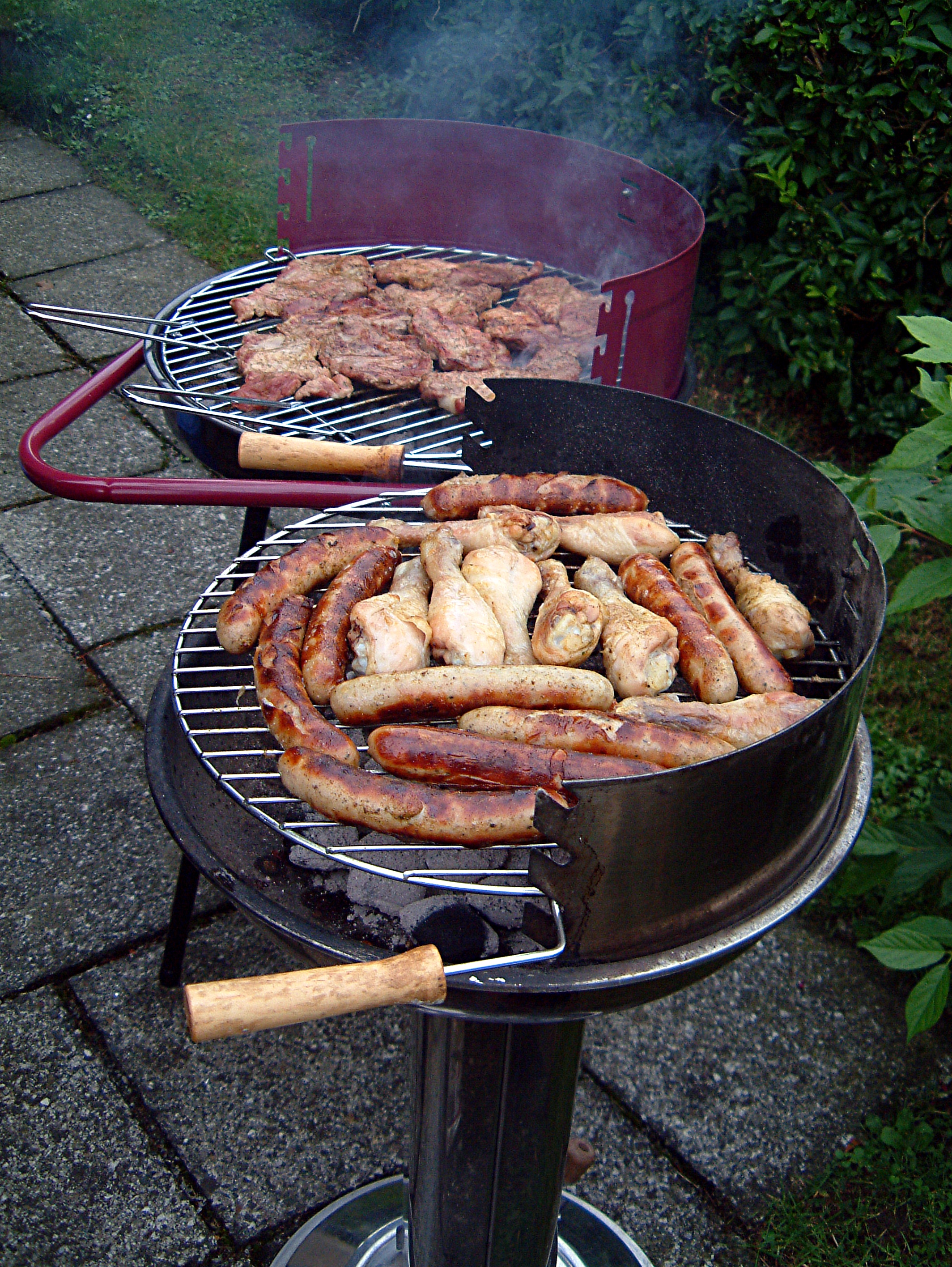 Barbecue